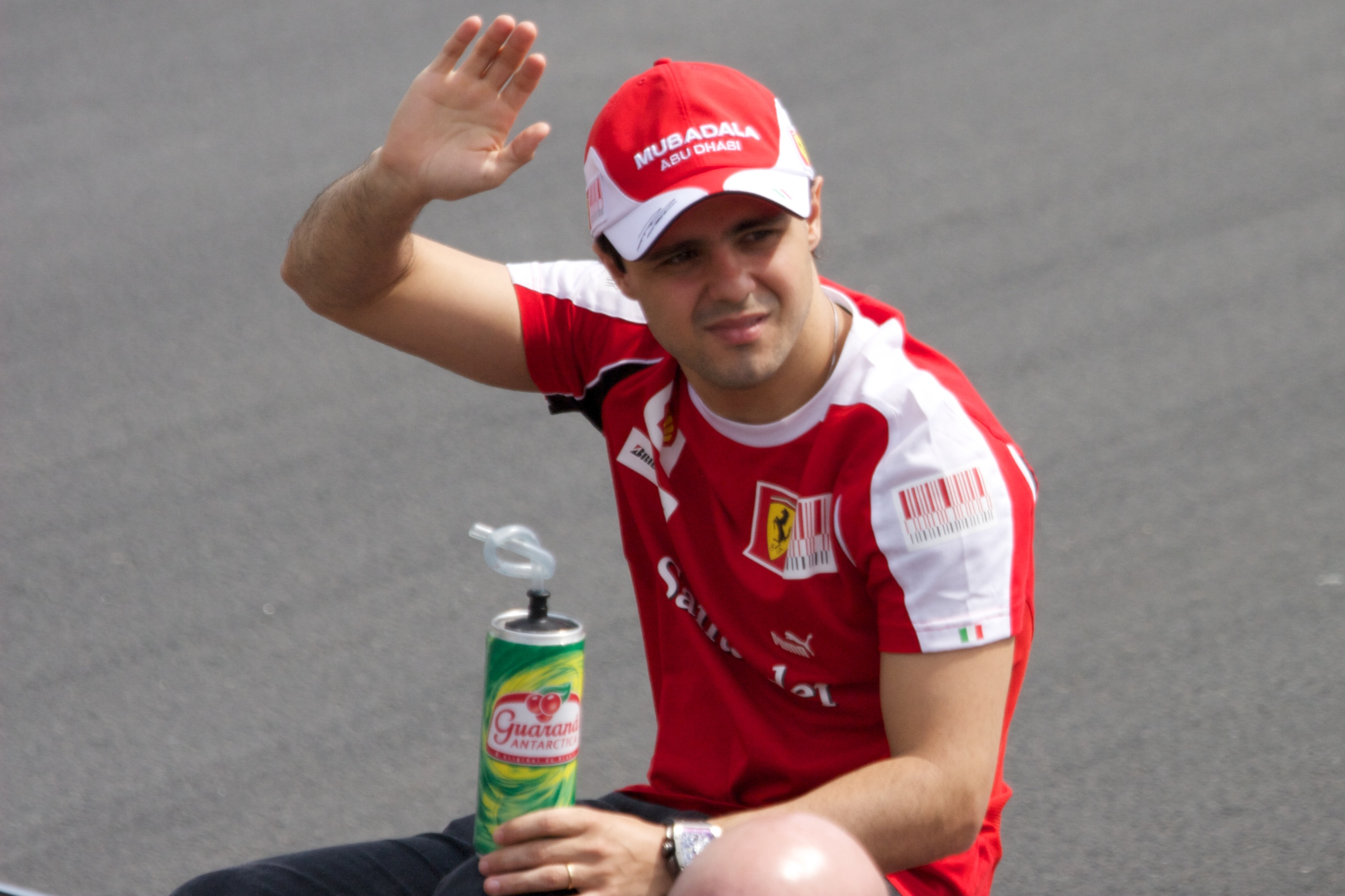 Felipe Massa at 2010 Canadian GP